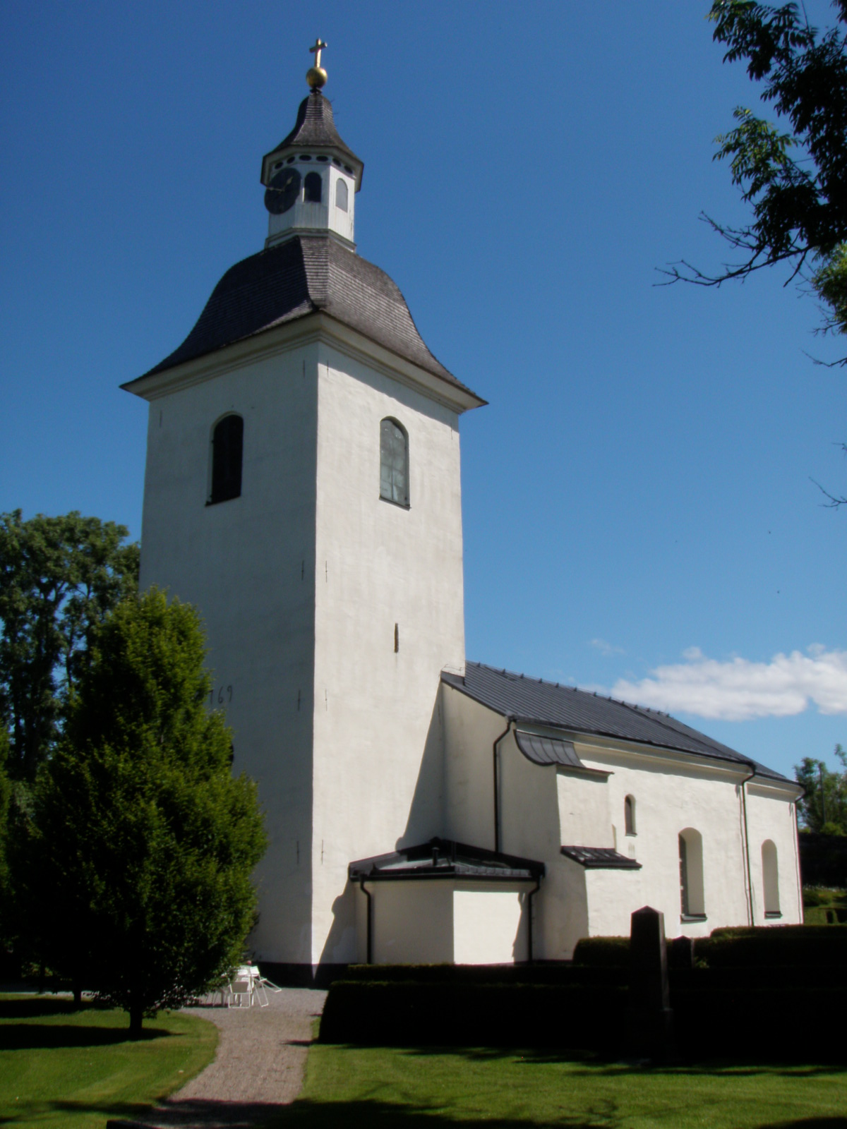 Tingstads kyrka är medeltida och uppfördes under första hälften av 1200-talet, men har byggts till under århundradena, bland annat 1769 då tornet tillkom och skeppets exteriör ändrades på 1860-talet.